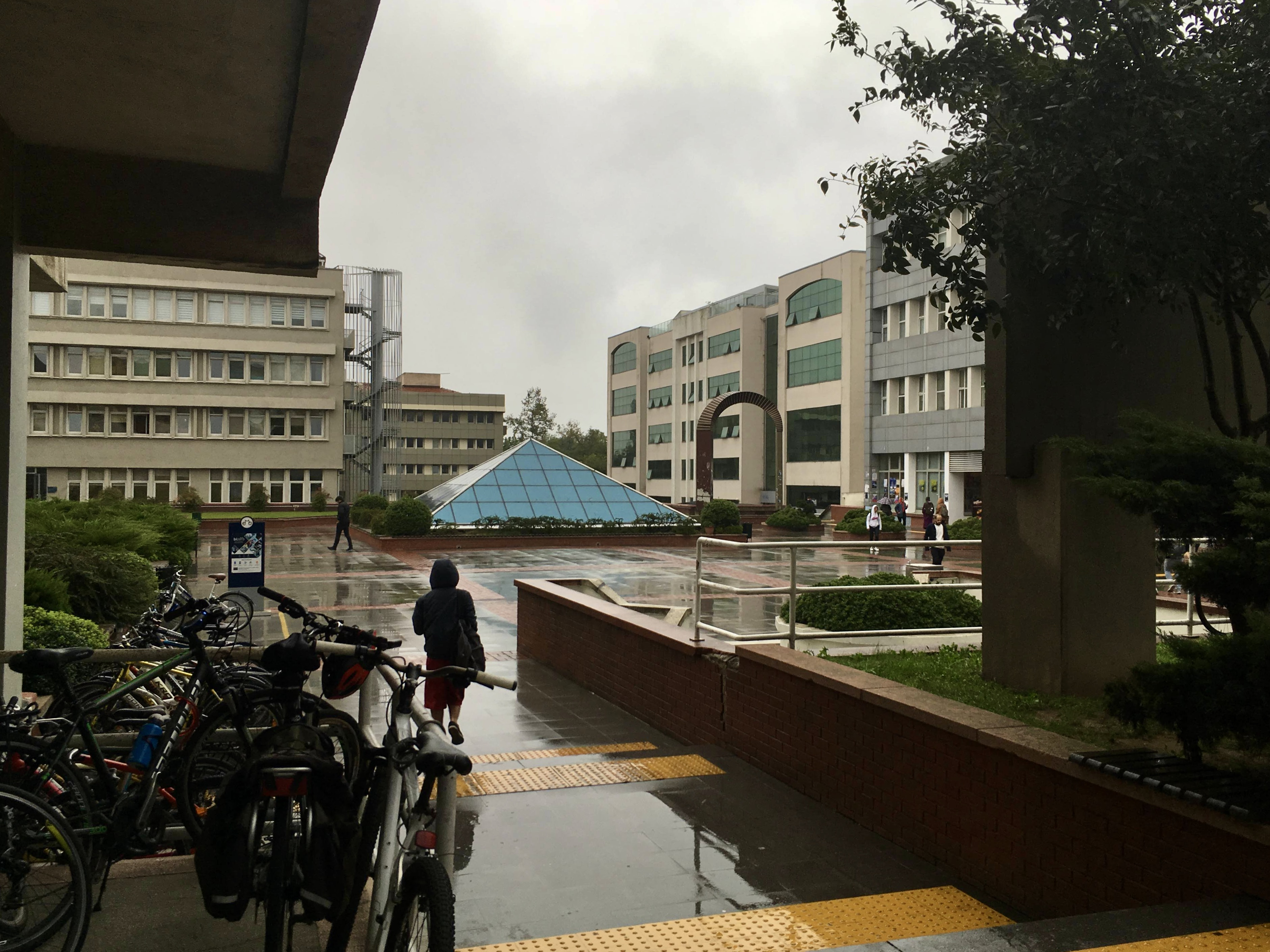 Boğaziçi Üniversitesi Kuzey Kampüs'e Aptullah Kuran Kütüphanesi önünden bir bakış